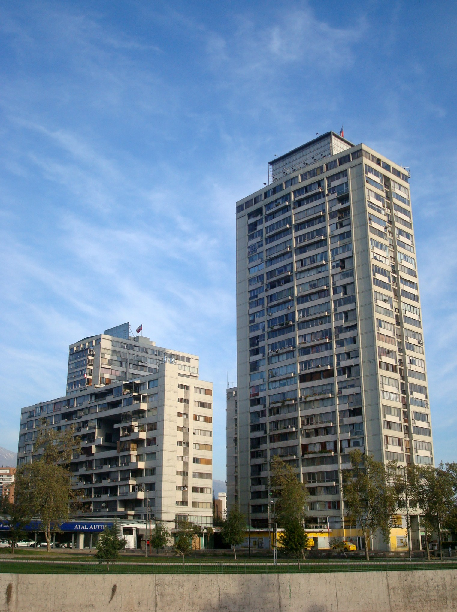 Torres de Tajamar, Providencia, Santiago, Chile